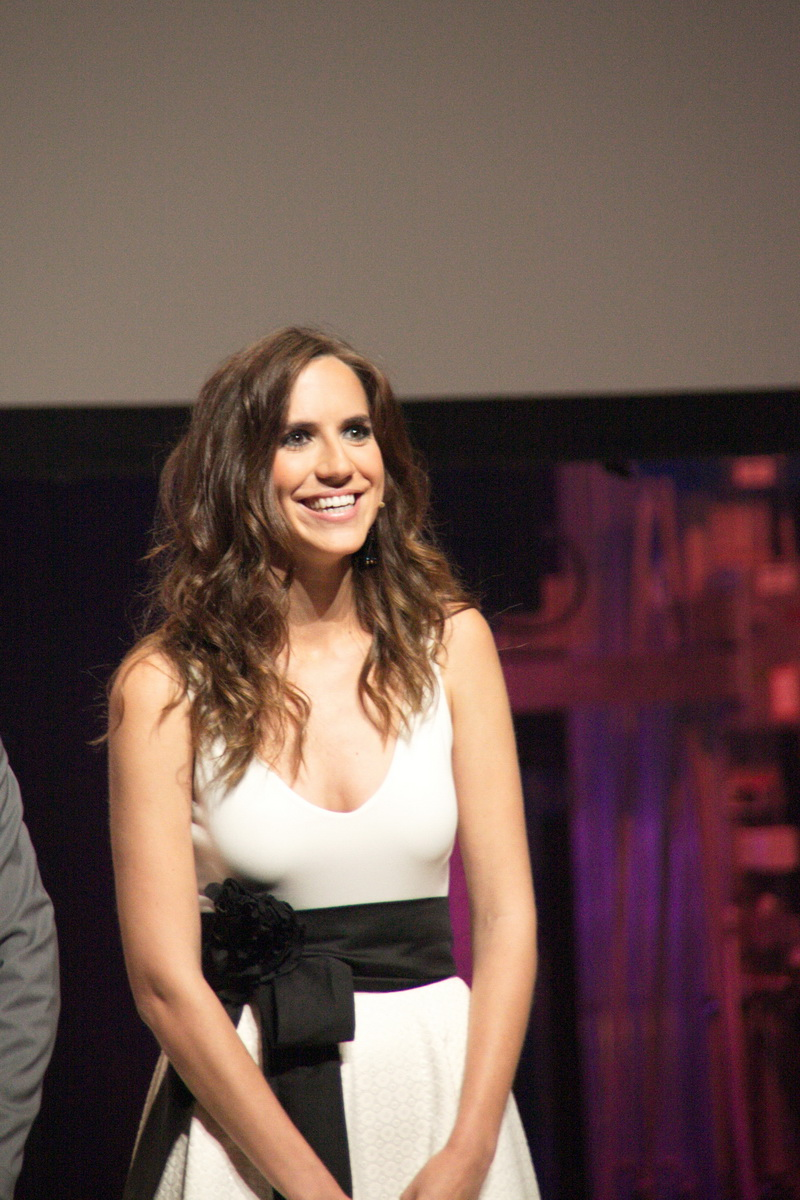 Lliurament dels Premis Nacionals de Cultura de Catalunya 2014. Santa Coloma de Gramenet, 2 de juny de 2014